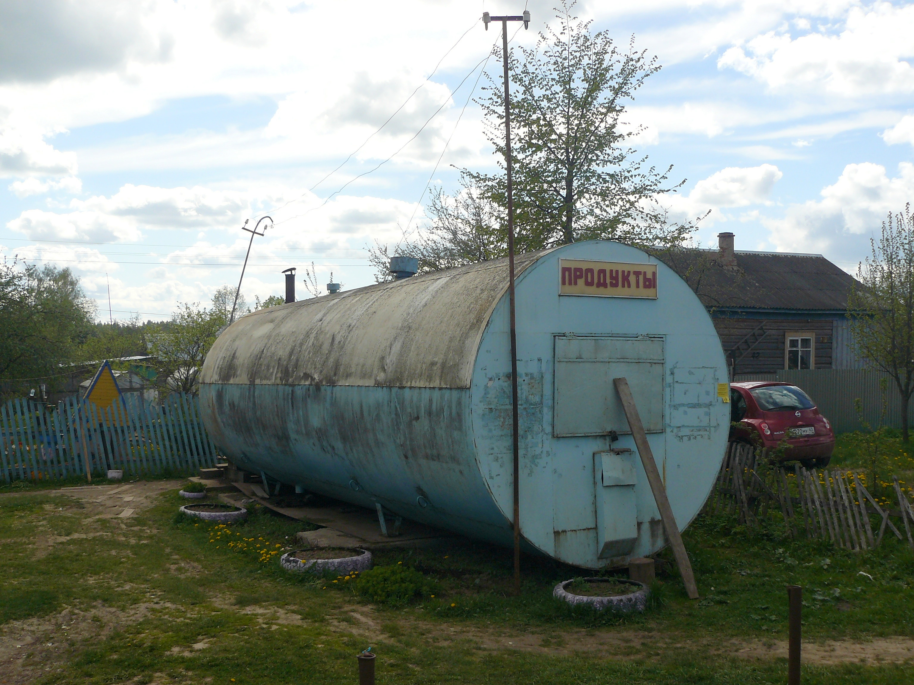 Деревня Глухово, Сельское поселение «Деревня Глухово». На снимке изображён ЦУБ-2М Сокольского ДОЗа (в 1975 году – ДОЗ-21), приспособленный под магазин. Временное жильё для работников Крайнего Севера и Сибири и т.п. В обиходе мог называться балок, бочка, бытовка.